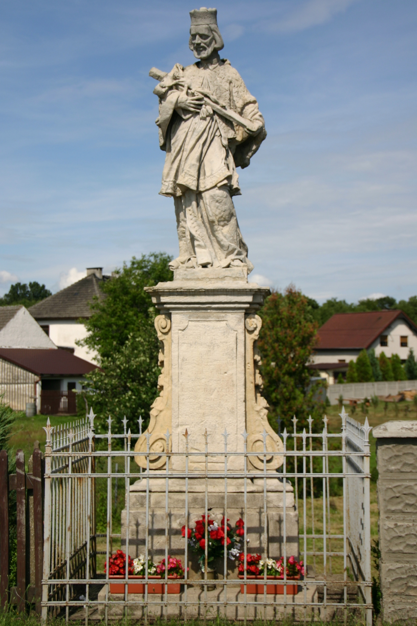 Strzeleczki (dodatkowa nazwa w j. niem. Klein Strehlitz[1]) – wieś w Polsce położona w województwie opolskim, w powiecie krapkowickim, w gminie Strzeleczki.